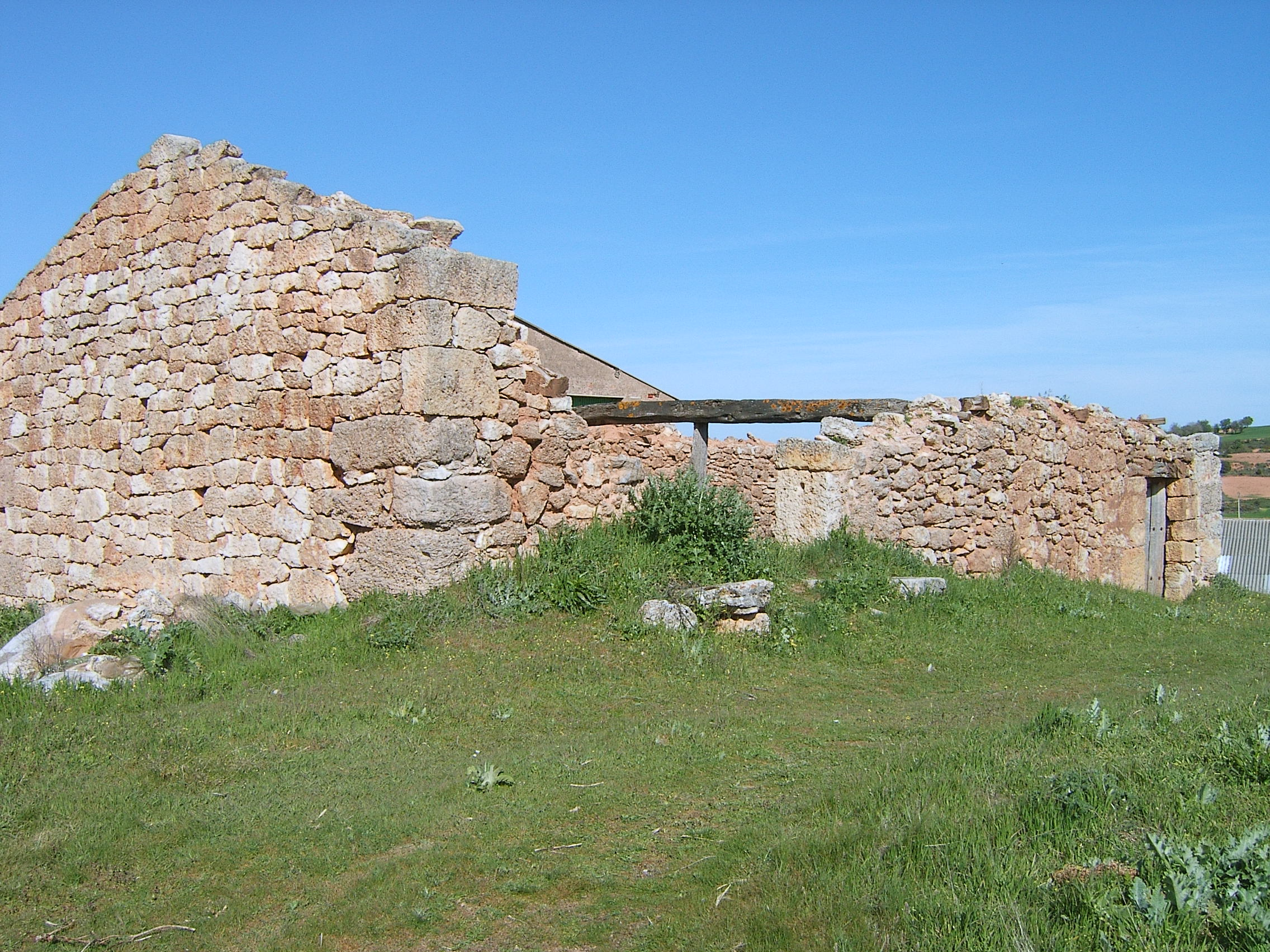 Foto del Lagar de Dios de Quintanilla de la Mata